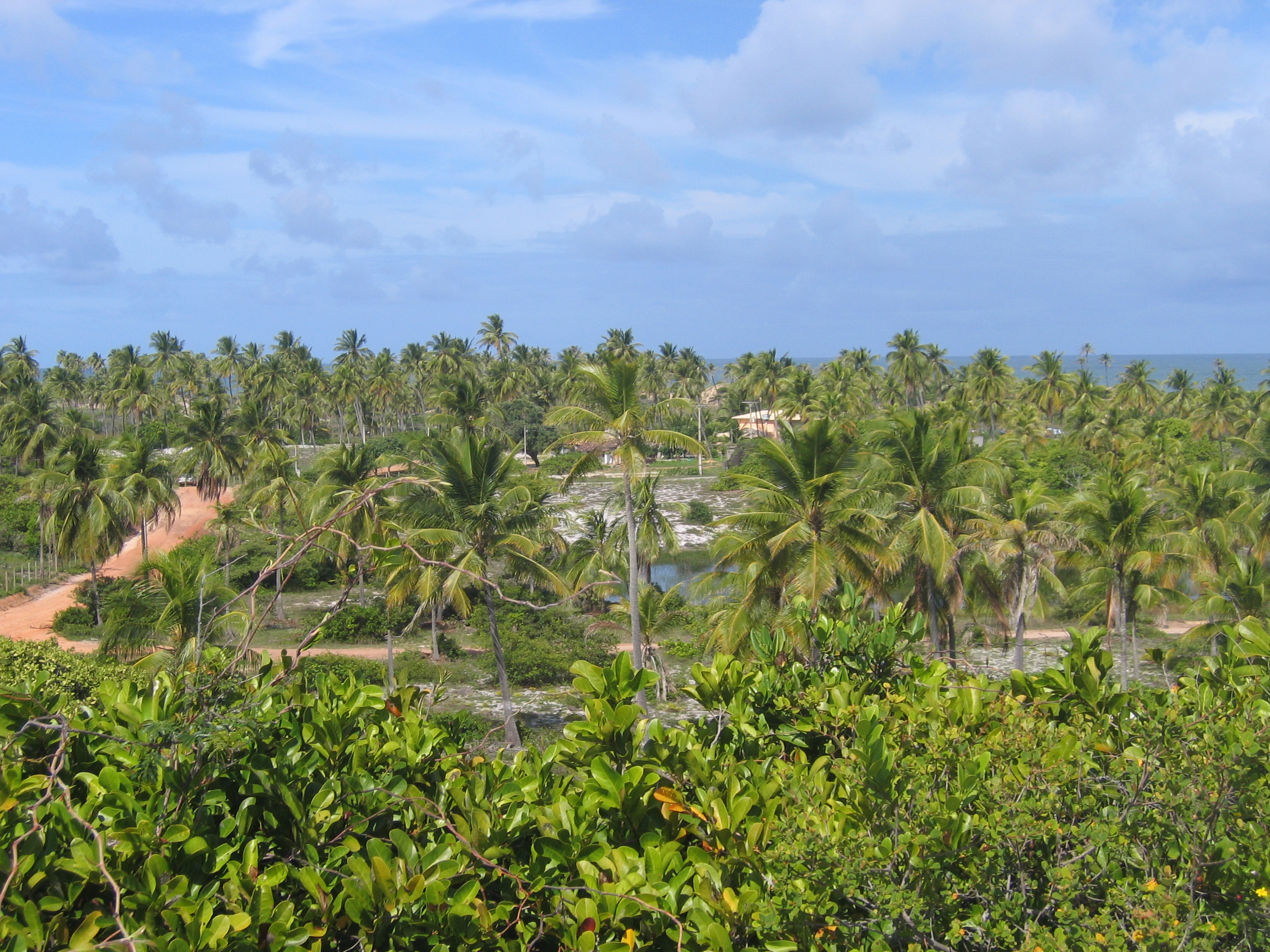 Coconut, Bahia, Brazil